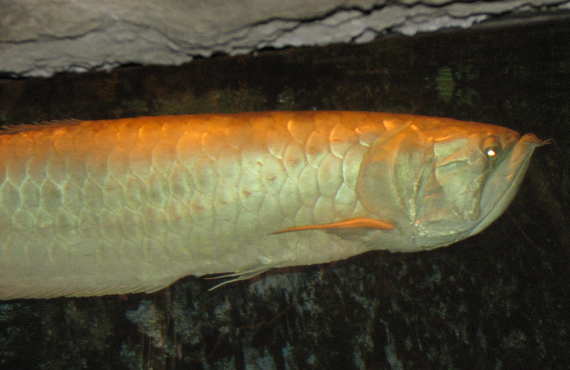 Arawana - Osteoglossum bicirrhosum